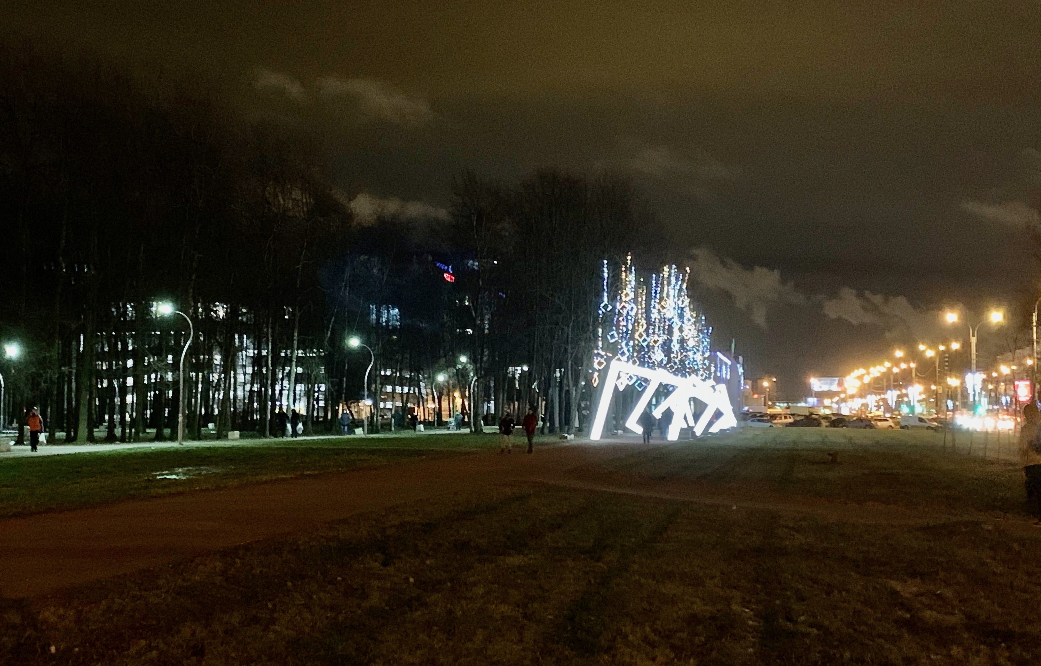 Парк имени Есенина